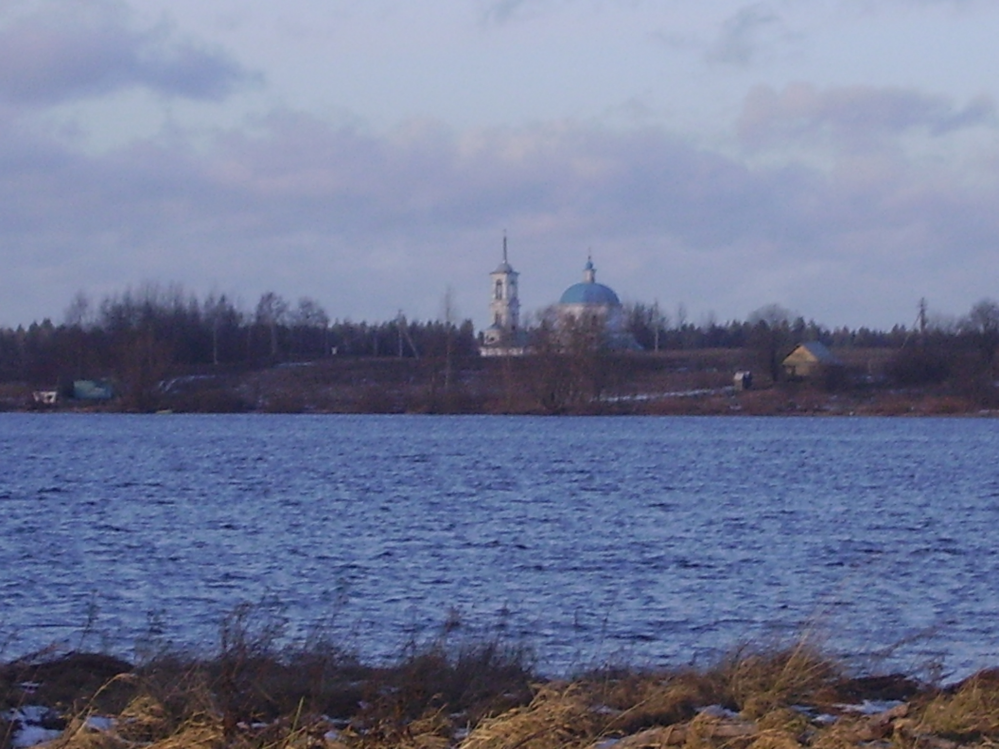 Озеро Пено (северо-восточный берег) с церковью Рождества Богородицы (село Вселуки). Вид из деревни Боровое.